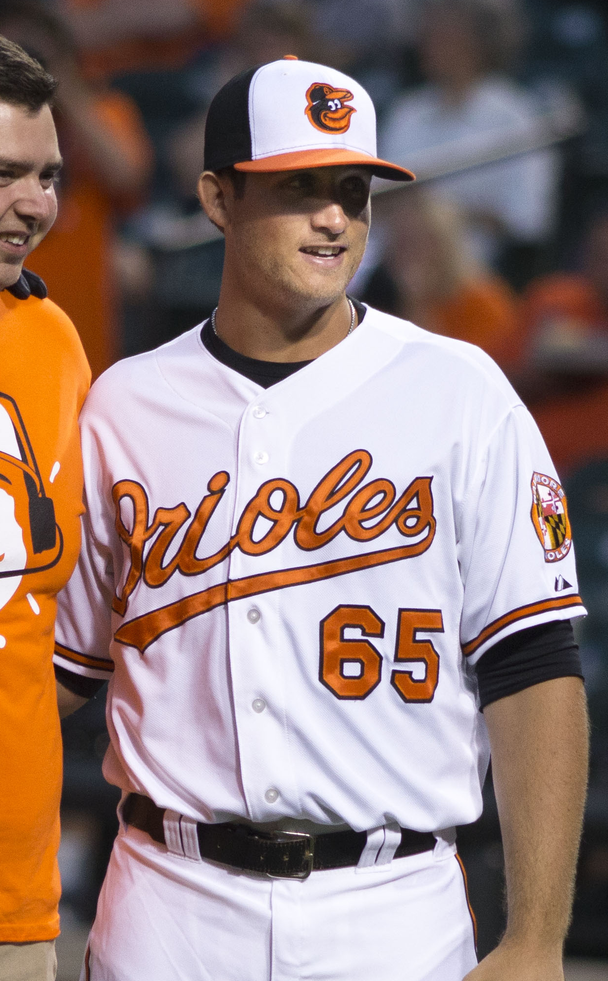 Mike Belfiore